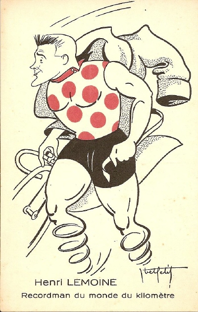 Henri Lemoine ; Recordman du Monde du Kilomètre